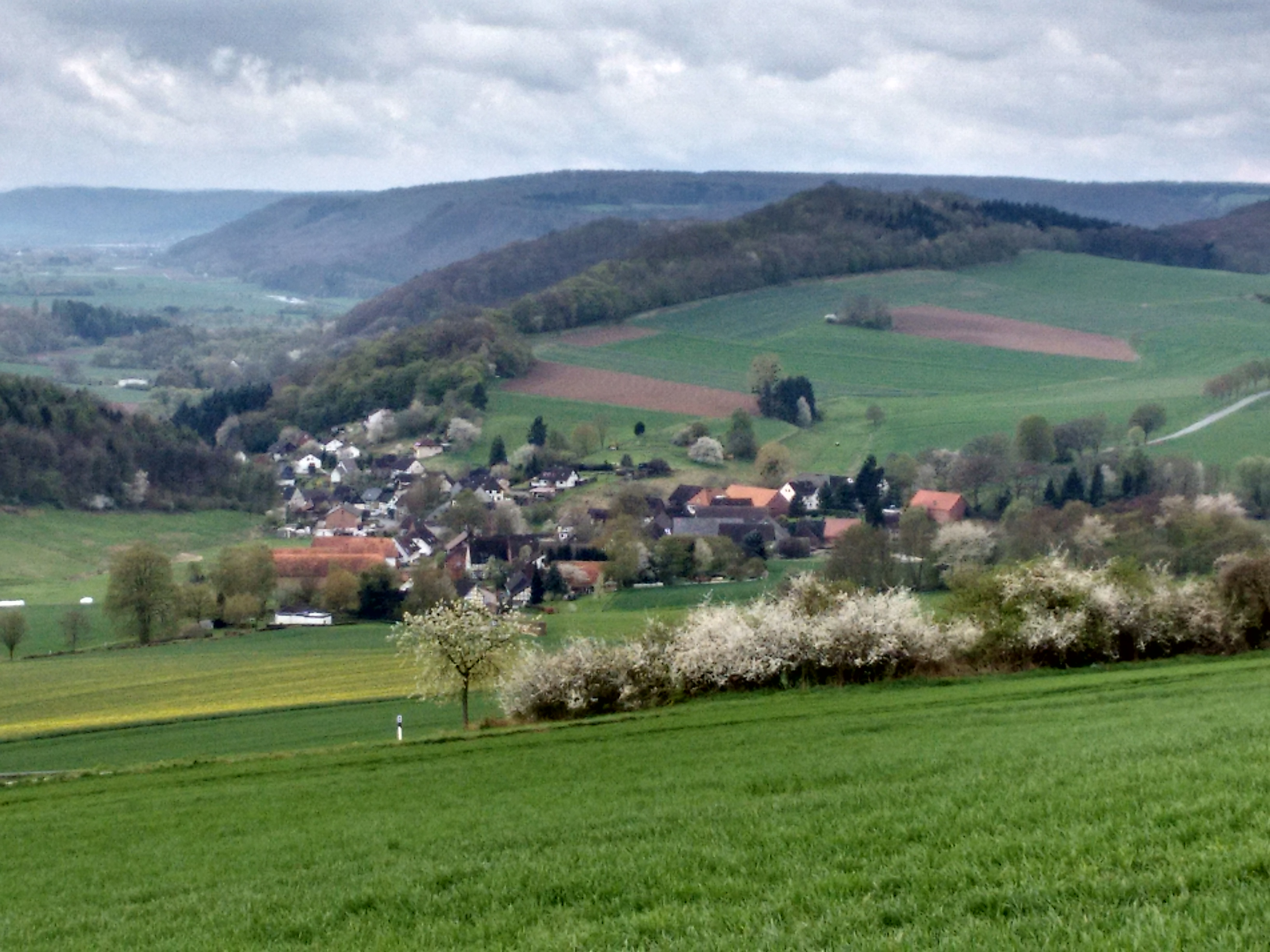 Blick vom Pass am Hangberg ins Wesertal. Vorne der Ort Lütgenade